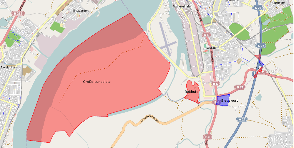 Karte von Bremerhaven mit Overlay der vom Staatsvertrag zwischen der Freien Hansestadt Bremen und dem Land Niedersachsen über die Änderung der gemeinsamen Landesgrenze vom 5. Mai 2009 betroffenen Gebiete. Rot gekennzeichnete Flächen kommen zu Bremen, blaue zu Niedersachsen.